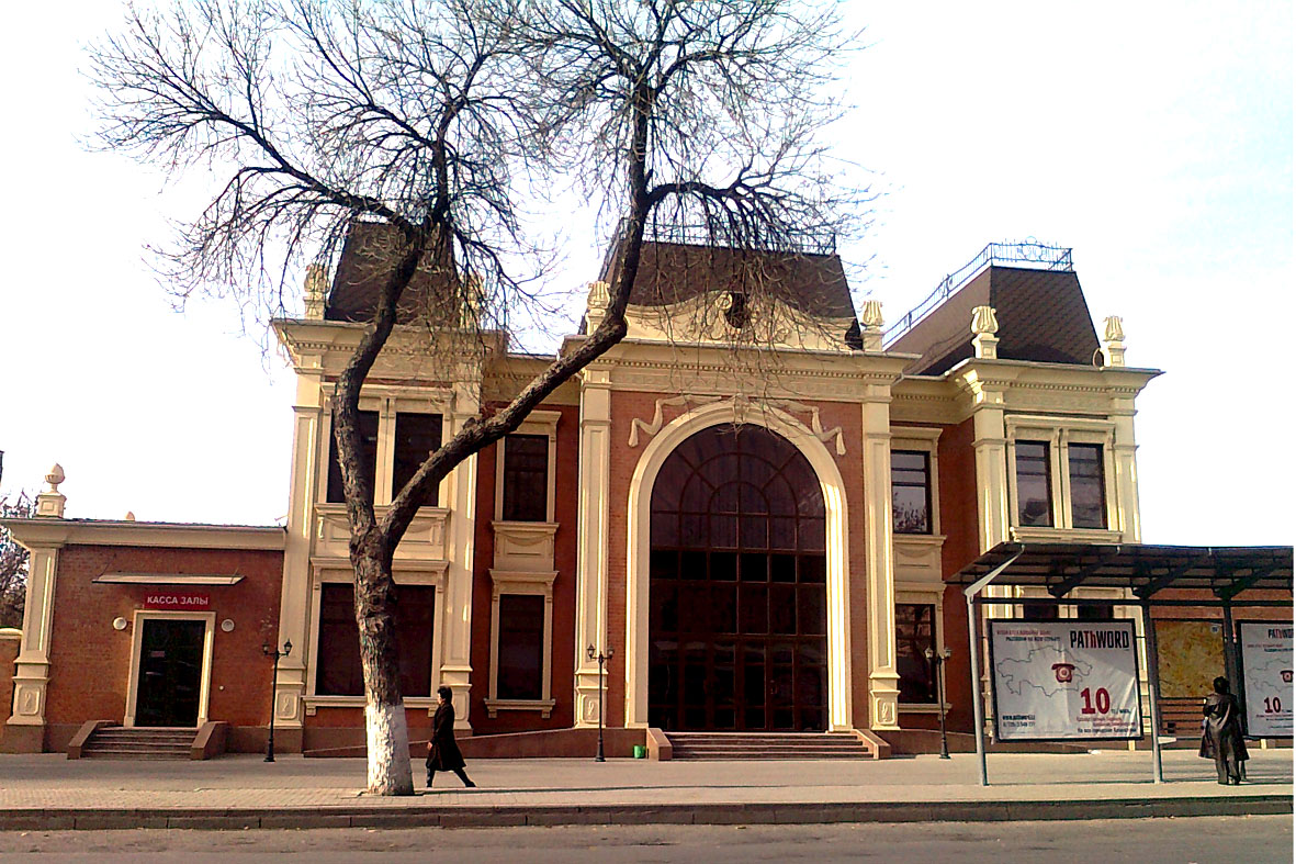 Областная филармония в г. Шымкент. Фасад.